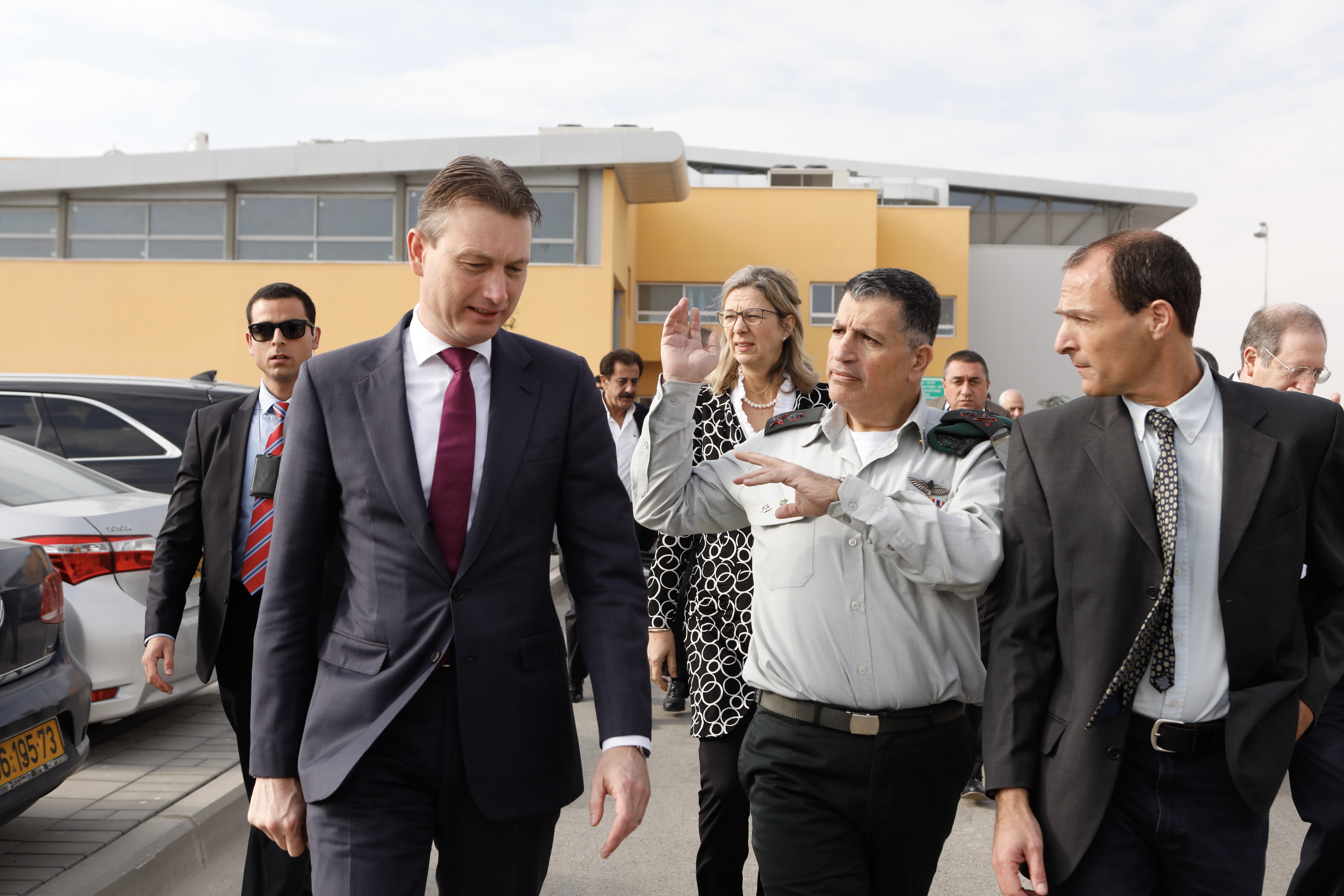 Minister Zijlstra bezoekt Israël en de Palestijnse gebieden. Tijdens zijn tweedaagse reis spreekt hij met de Israëlische premier Benjamin Netanyahu en de Palestijnse president Mahmoud Abbas. Daarnaast brengt hij een bezoek aan een door Nederland gefinancierde containerscanner op de grens van de Westelijke Jordaanoever met Jordanië, spreekt hij met mensenrechtenorganisaties en bezoekt hij een Holocaust herdenkingsplaats. Ook voert hij gesprekken met de Israëlische president Reuven Rivlin en de Palestijnse premier Rami Hamdallah en minister van Buitenlandse Zaken Riad Malki.